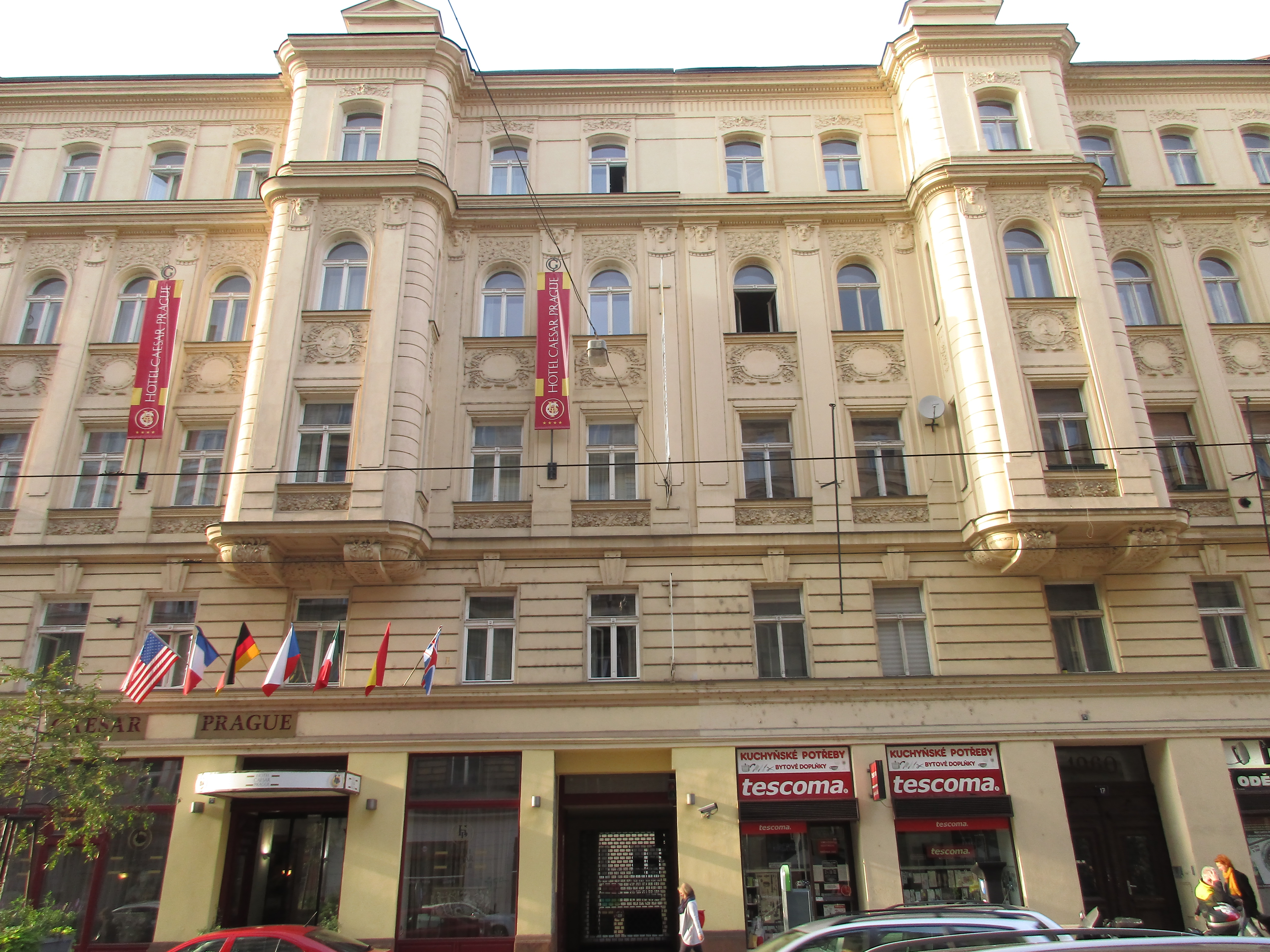 Tiskárna Grafia, Praha.